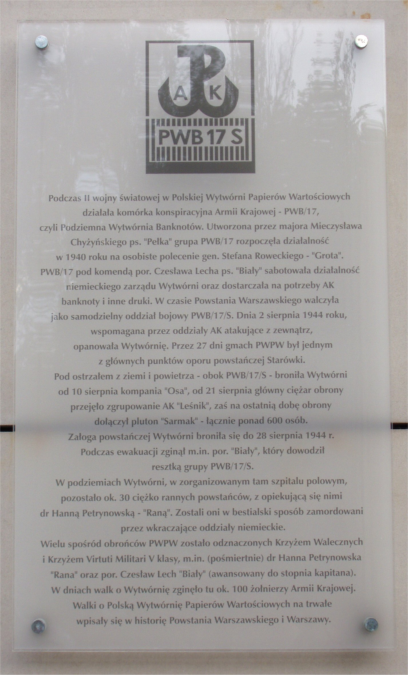 Polska Wytwórnia Papierów Wartościowych u zbiegu ul. Sanguszki i Zakroczymskiej w Warszawie (fot Zu)